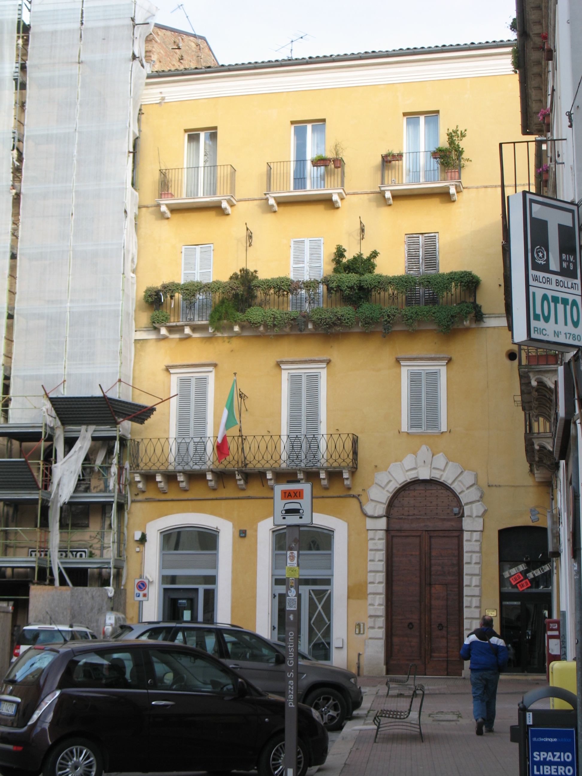 Il Palazzo Sirolli fu edificato dalla famiglia di mercanti Spinelli nel XVI secolo. Questa è la facciata di Piazza Vittorio Emanuele.